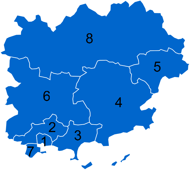 Résultats des élections législatives du Var en 2012